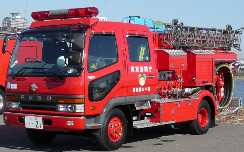 特別消火中隊のポンプ車。東京消防出初式にて撮影。